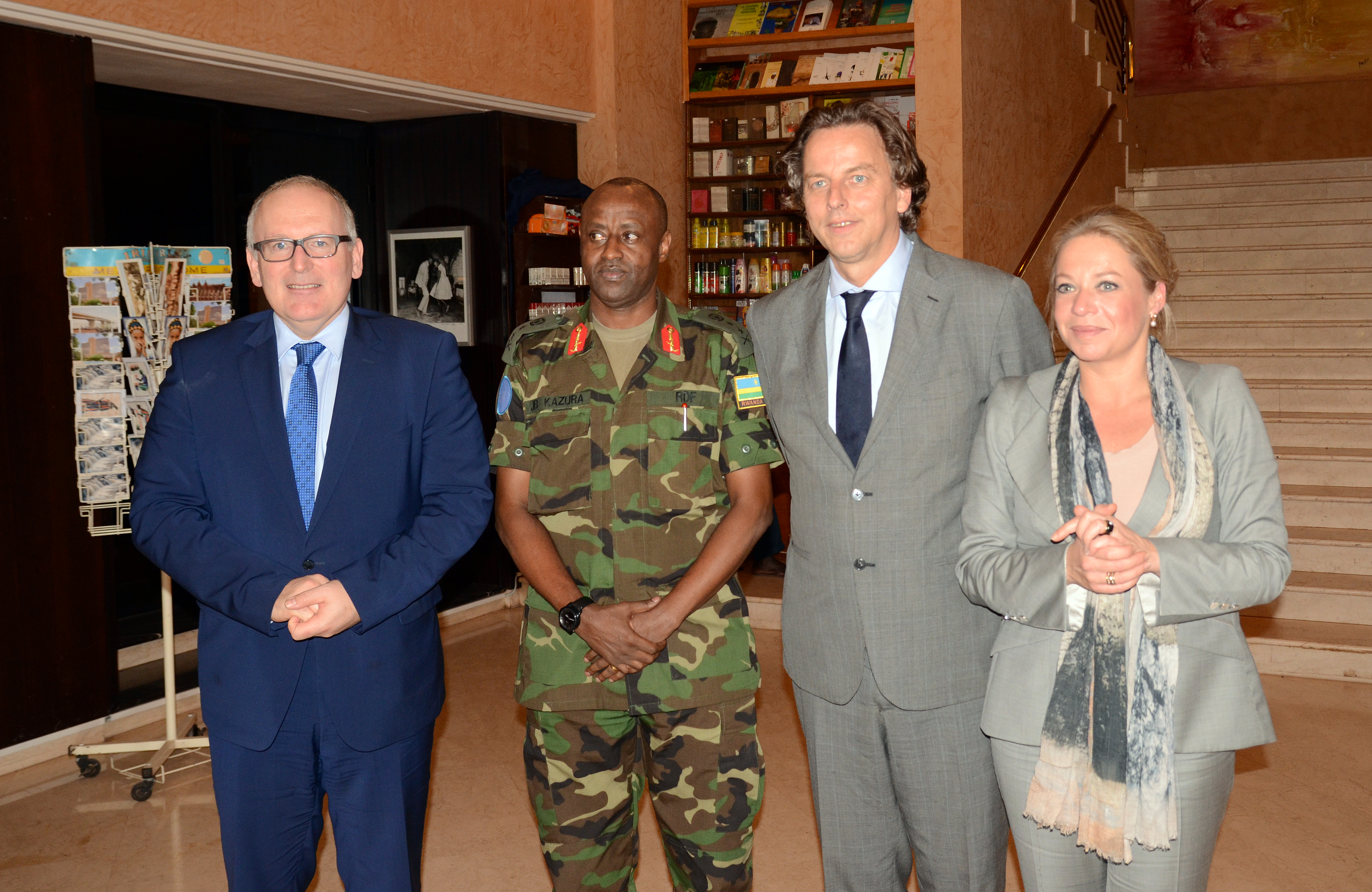 131128 Timmermans en Hennis bij Koenders en Kazura MINUSMA